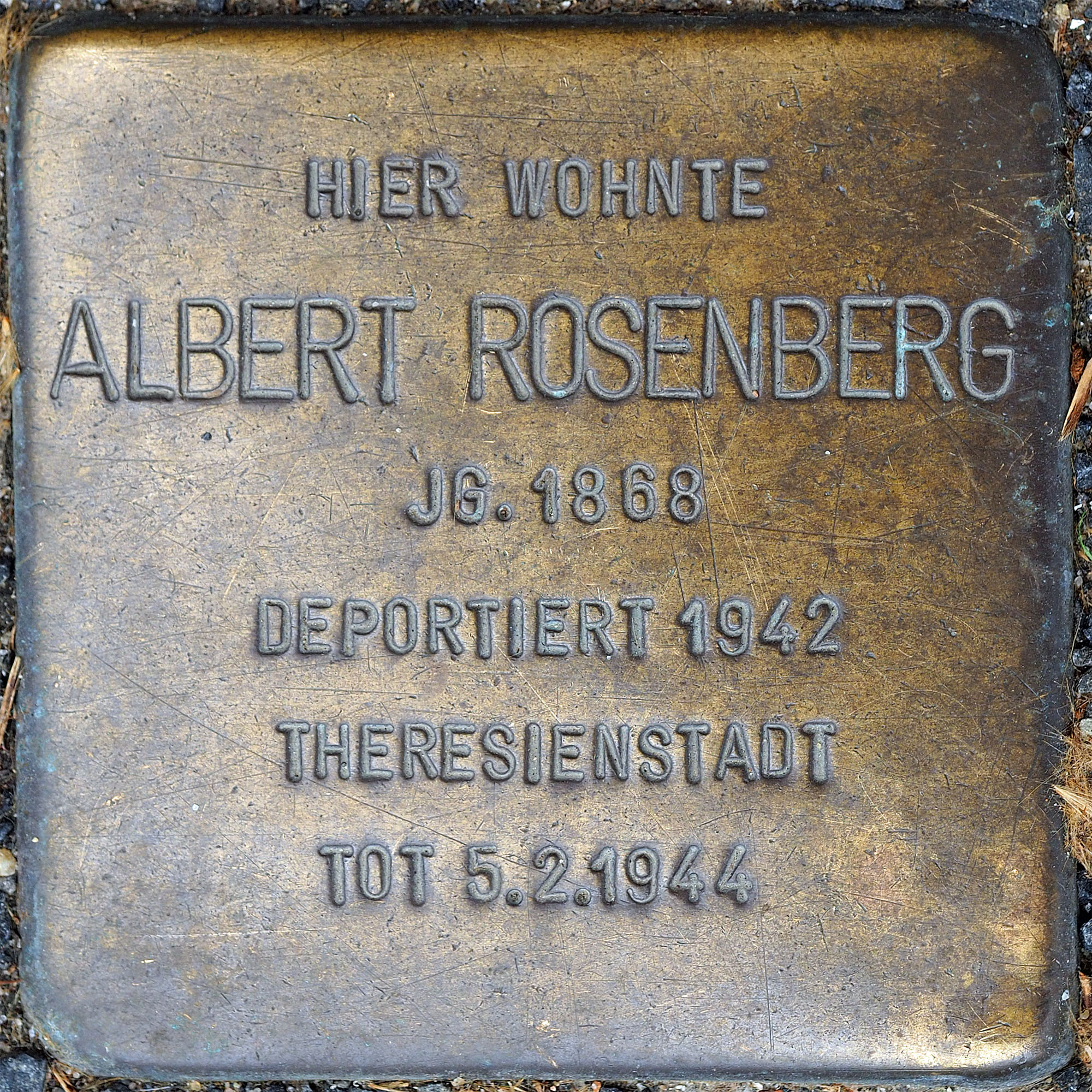 Stolpersteine MG: Rosenberg, Albert